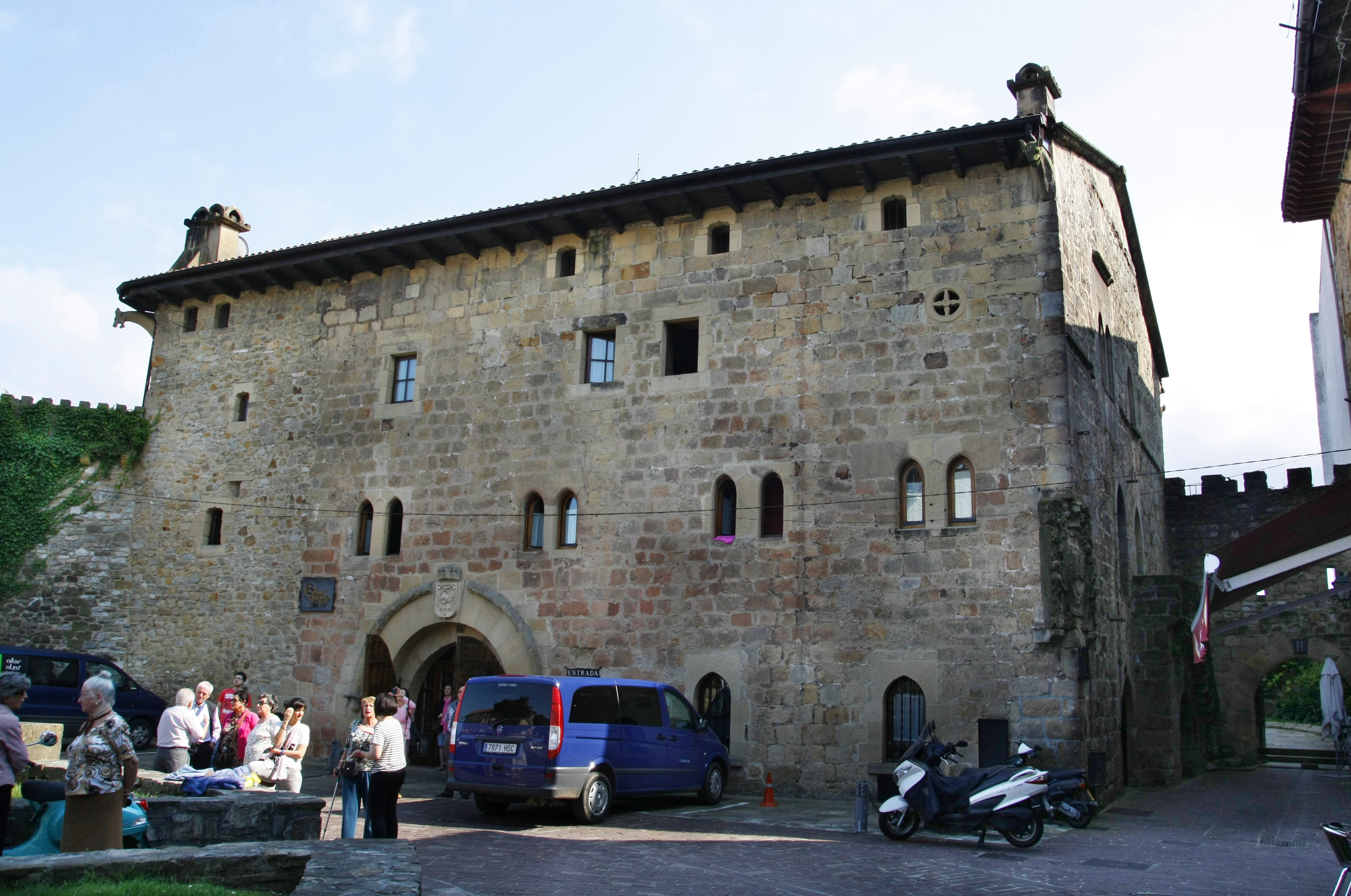 Casa Etxebeste - Hondarribia